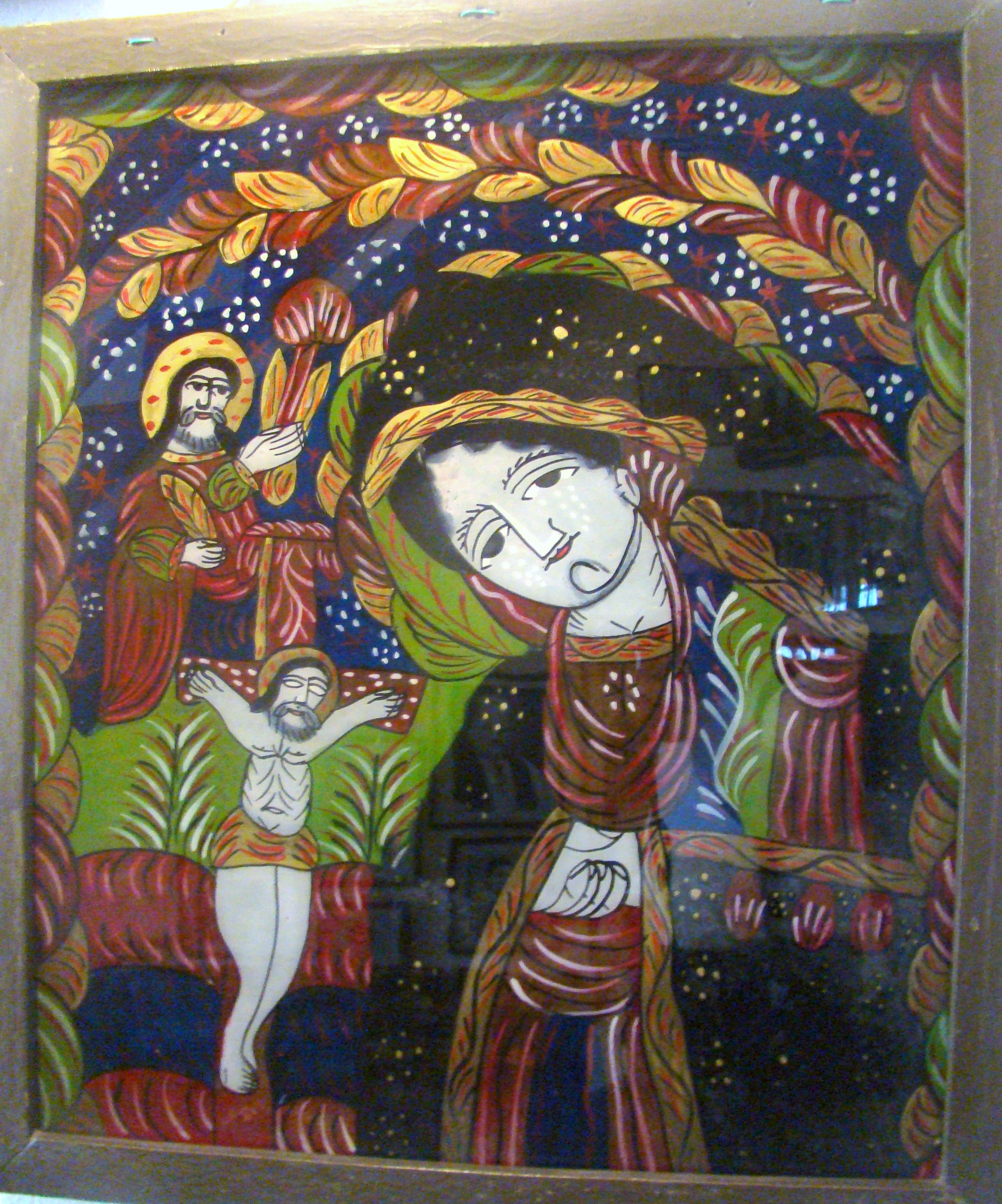 Muzeul de icoane pe sticlă „Pr.Zosim Oancea” din Sibiel